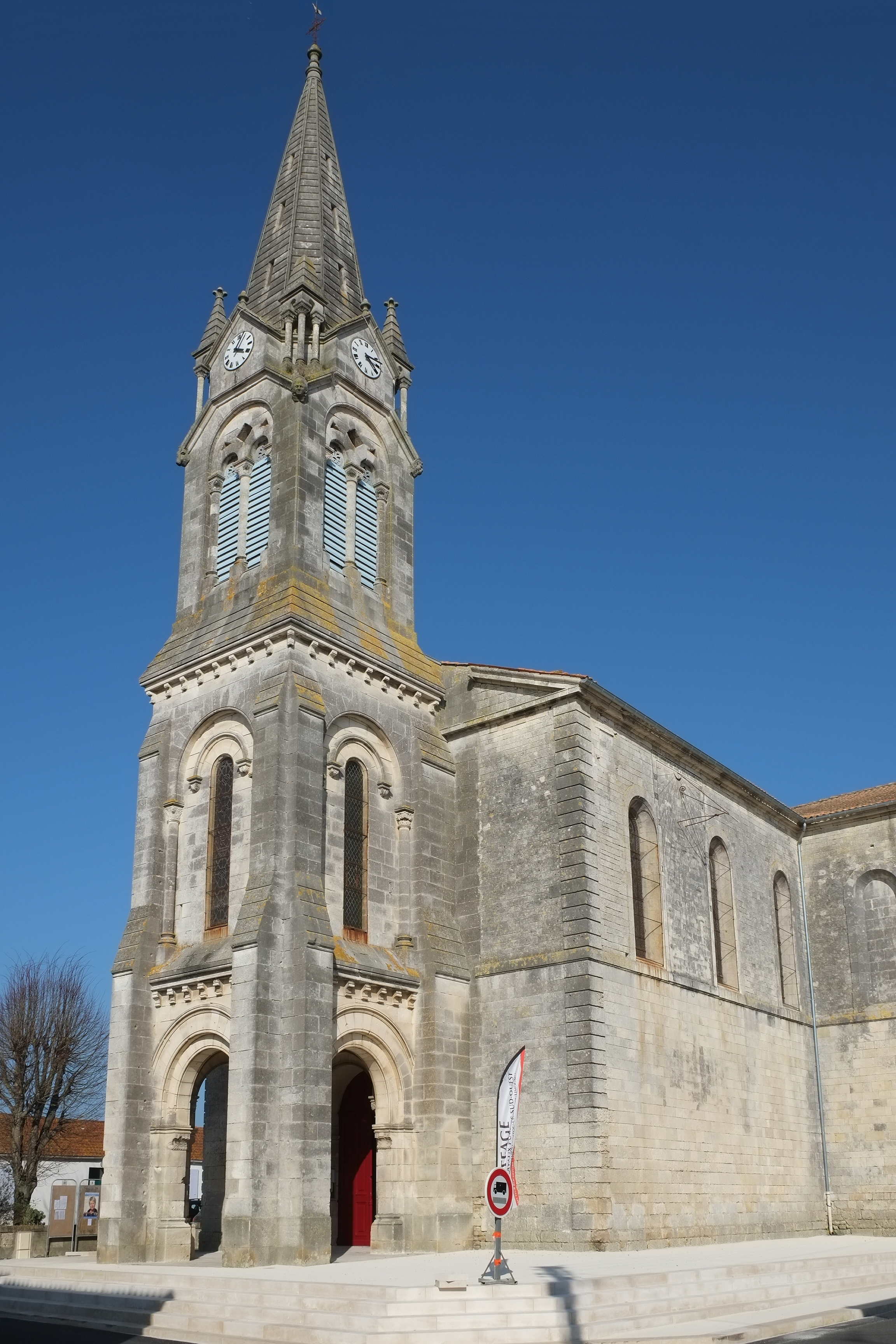 Église Notre-Dame-de-l'Assomption le Château d'Oléron Charente-maritime France